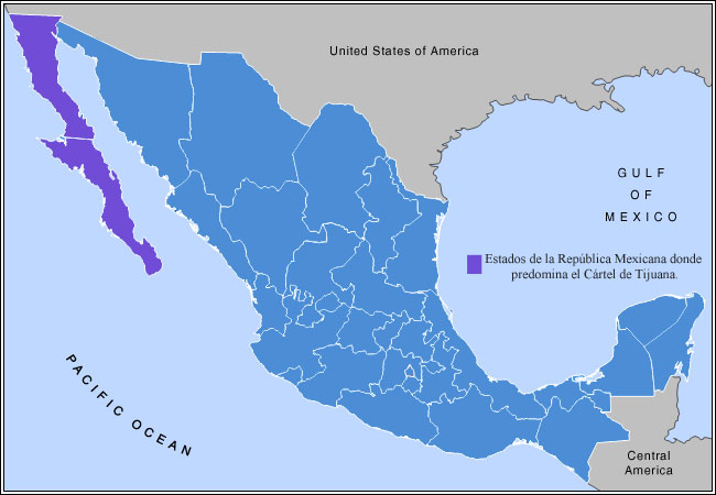 Mapa donde se muestra las zonas de predominio principales del Cártel de Tijuana.